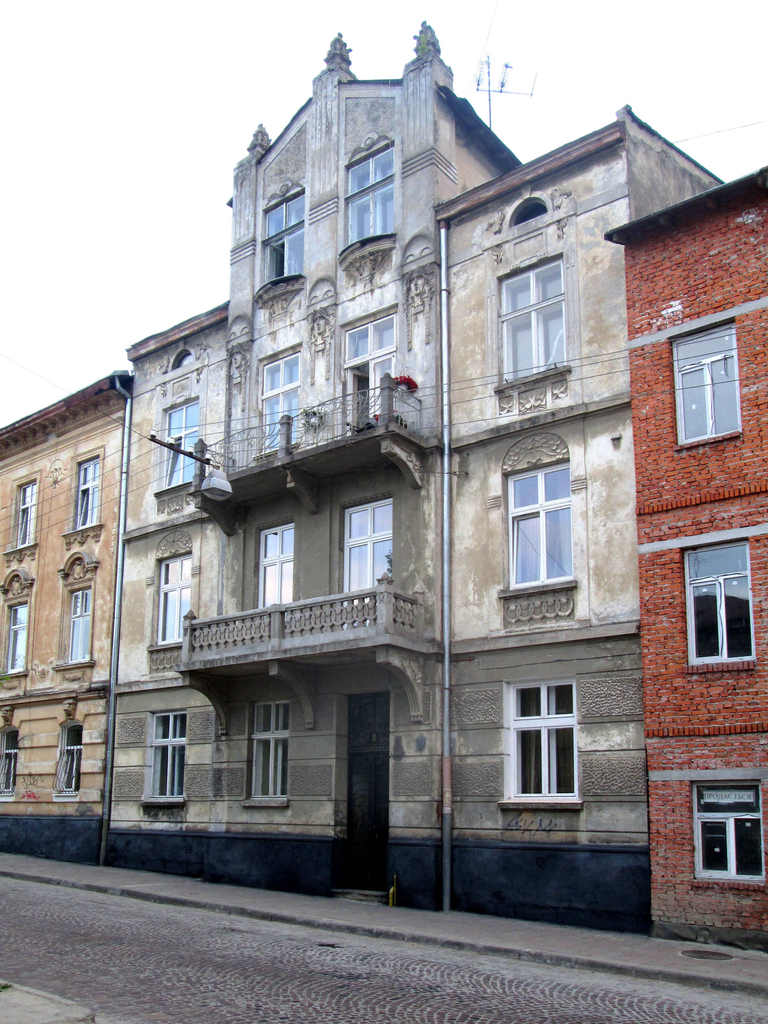 Будинок № 8 на вулиці Архипенка у Львові